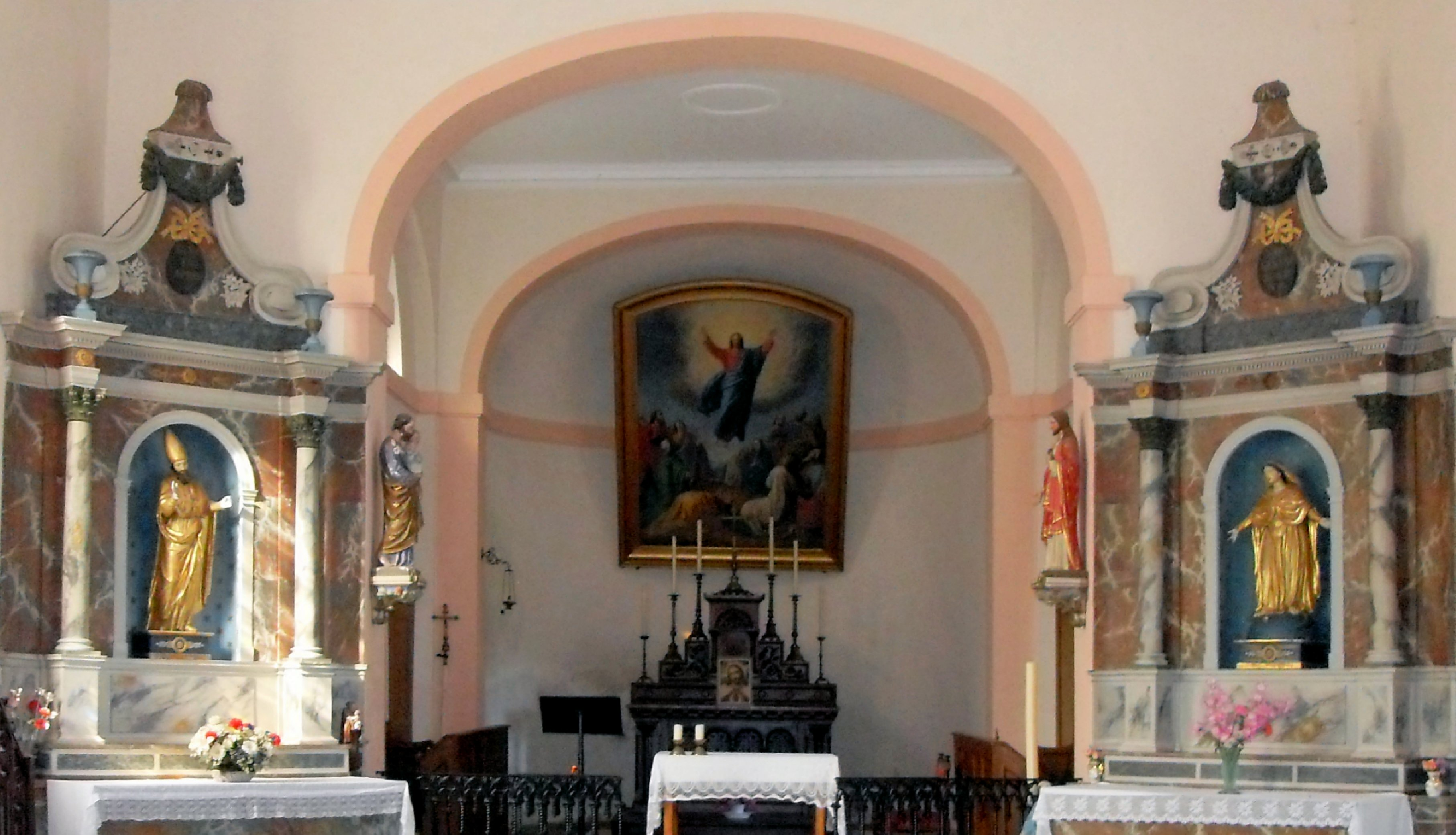 L'intérieur d'église Saint-Epvre à Domèvre-sous-Montfort